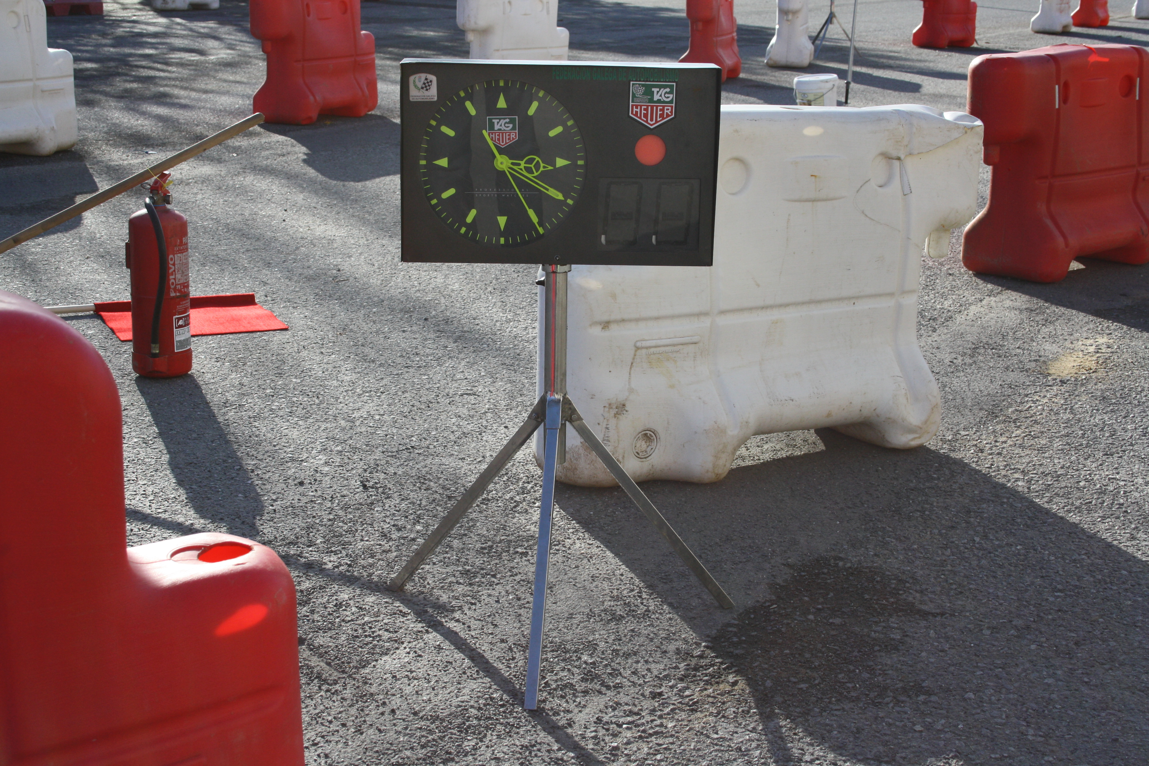 Crono TAG Heur